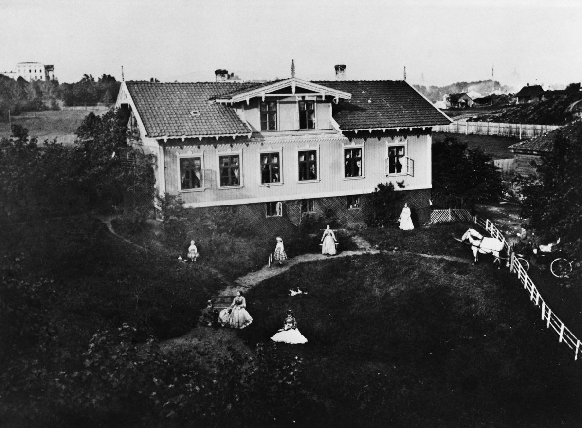 Munkedamsveien 57, med familien Mechelin i hagen, ifølge Digitalt museum. Ukjent fotograf, ca. 1860–70. Fra Byhistorisk samling hos Oslo Museum.